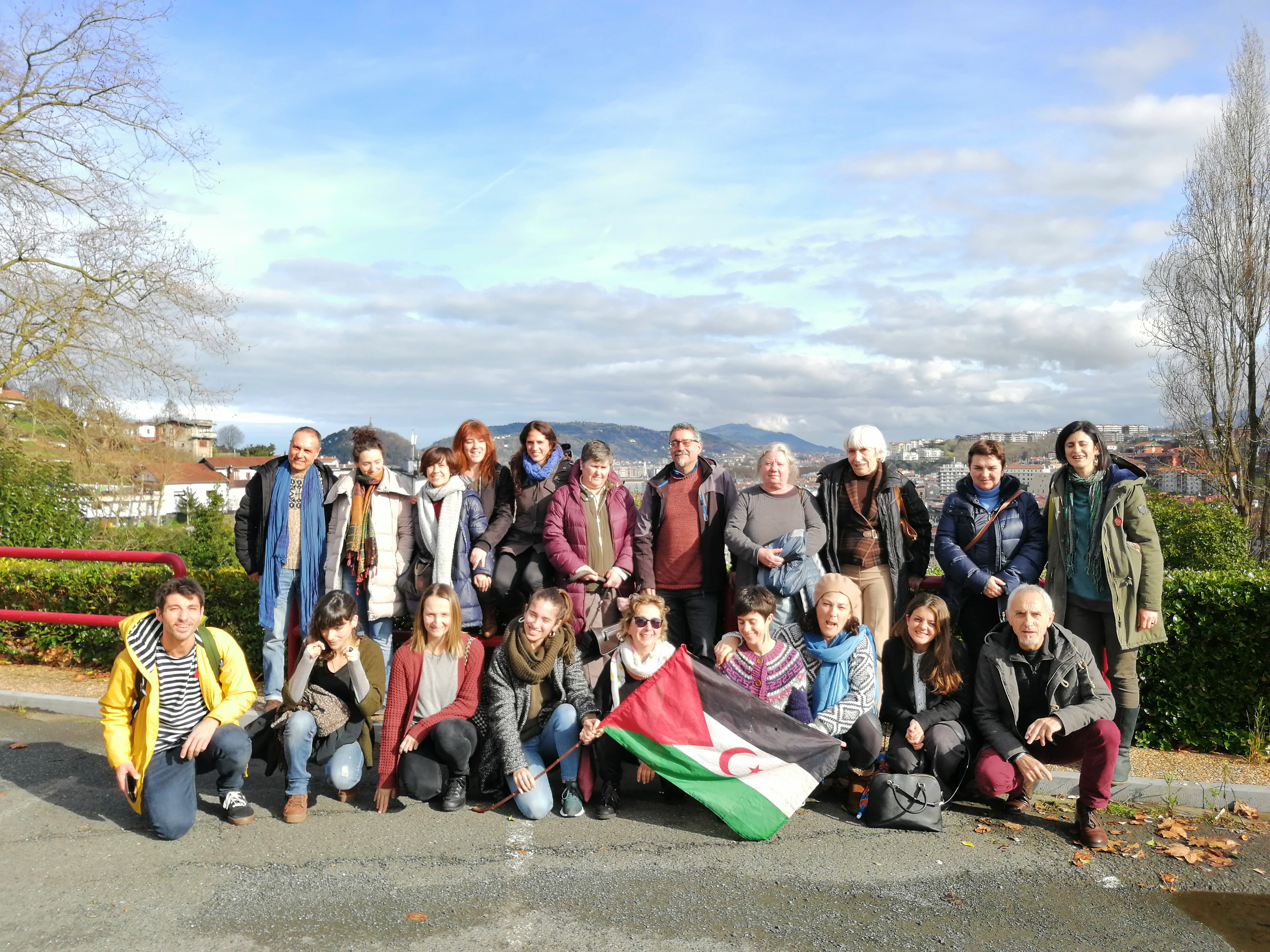 Mundubat Fundazioko saharako kanpamenduetarako mediku taldea.